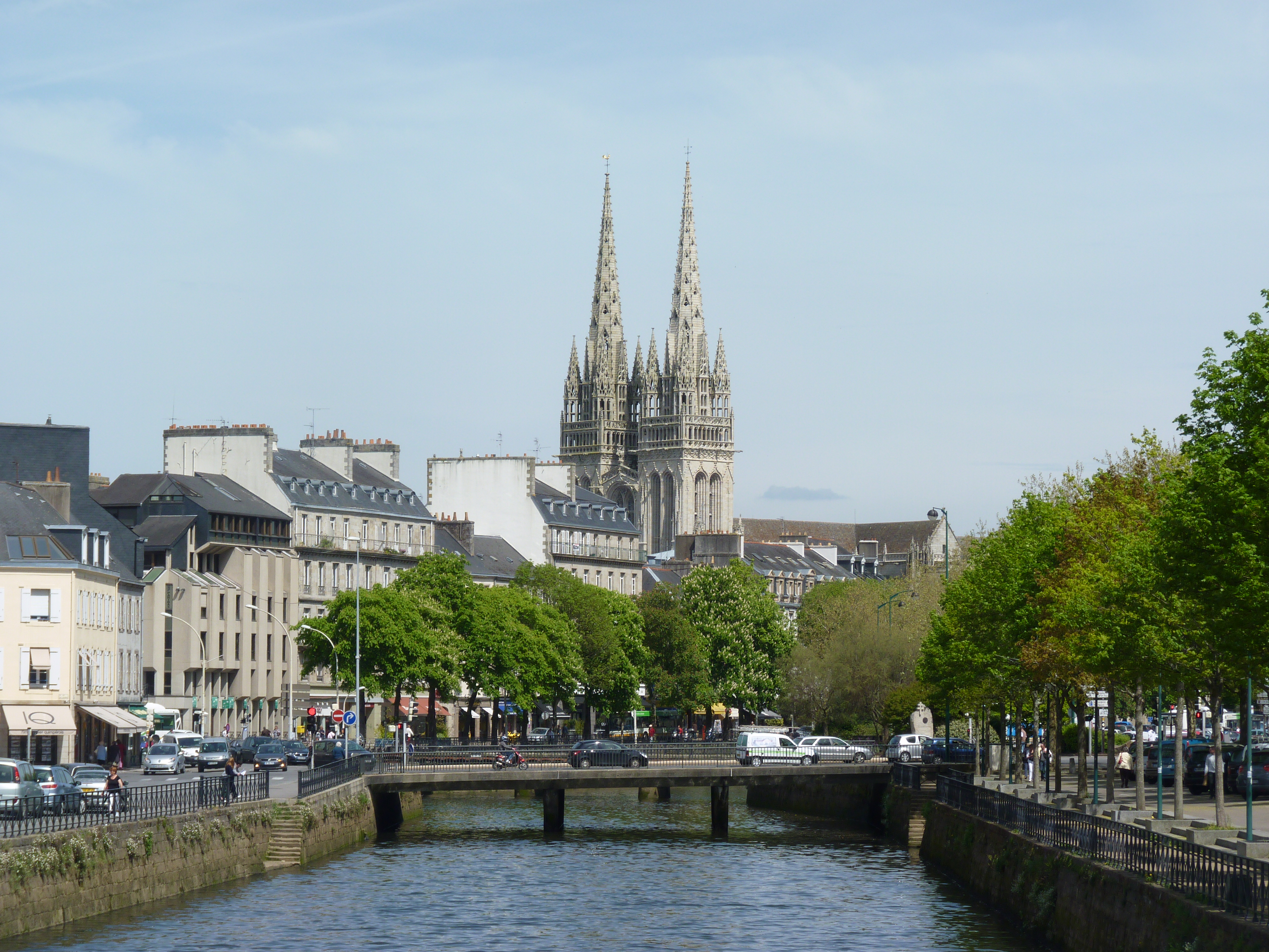 Quimper : les rives de l'Odet et les tours de la cathédrale Saint-Corentin